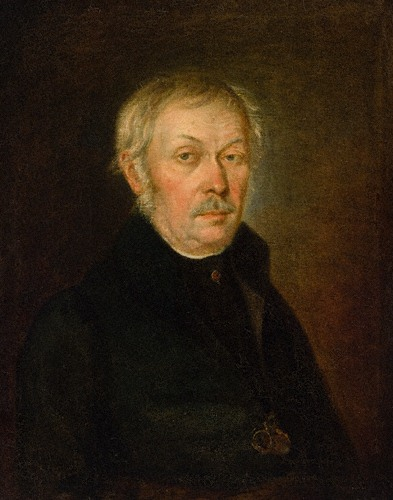 Партрэт Ігната Манкевіча